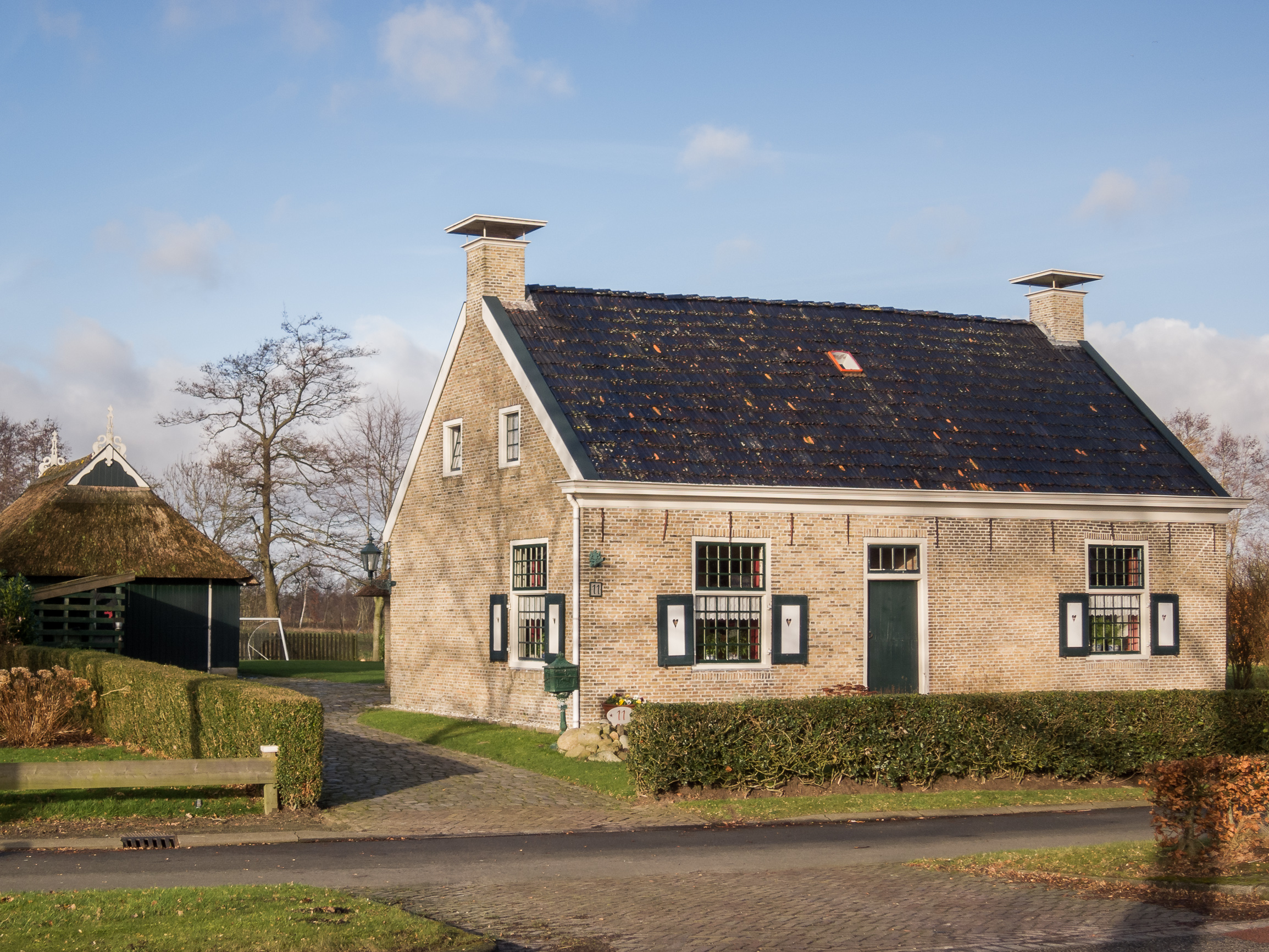 Woning tussen topgevels onder zadeldak waarop schoorstenen met borden